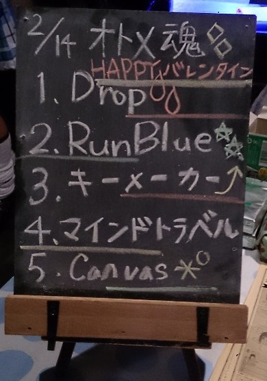 amiinaセトリボード(20150214(1))